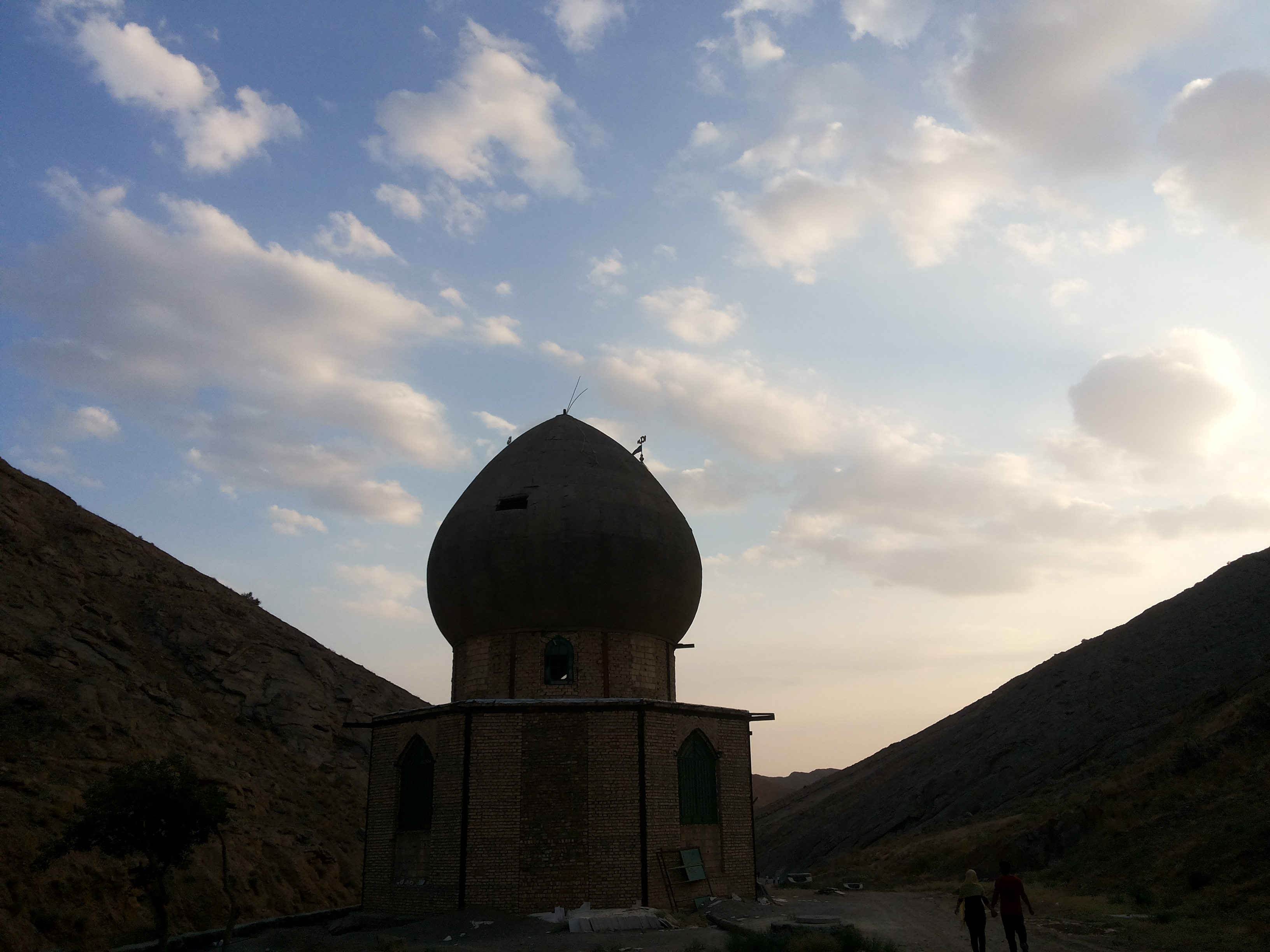 بنای نیمه کاره ی امام زاده